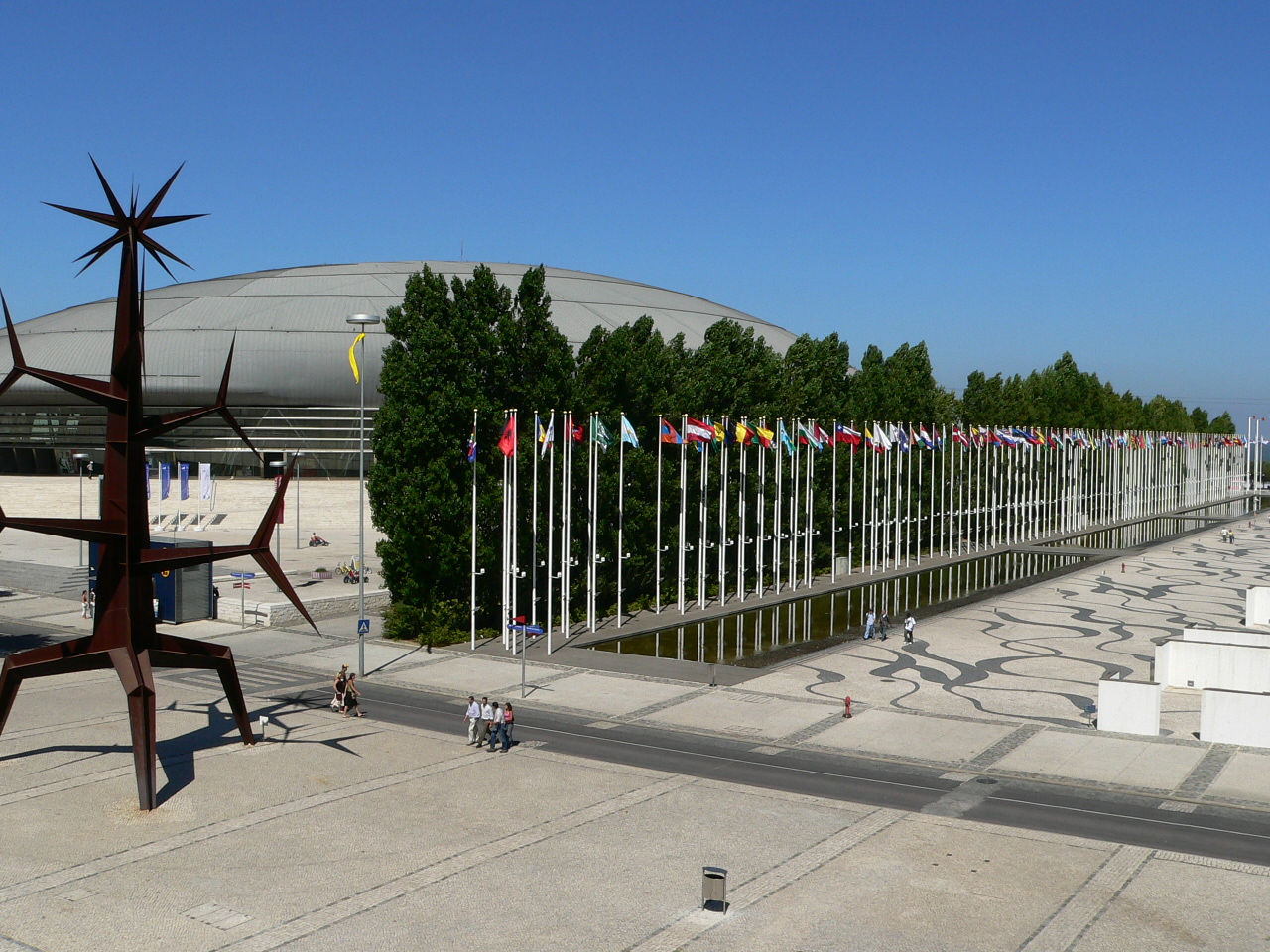 Pavilhão Atlântico, vista parcial